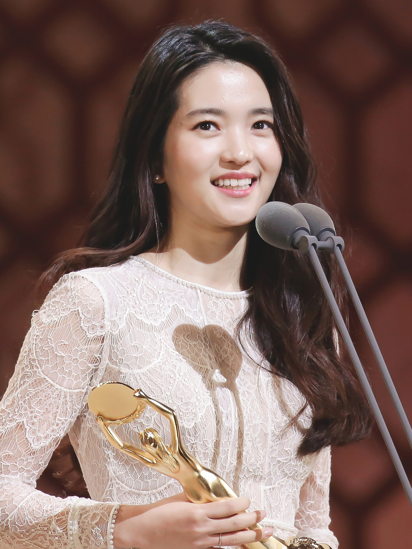 161125 제37회 청룡영화상 신인여우상 수상 김태리 직찍